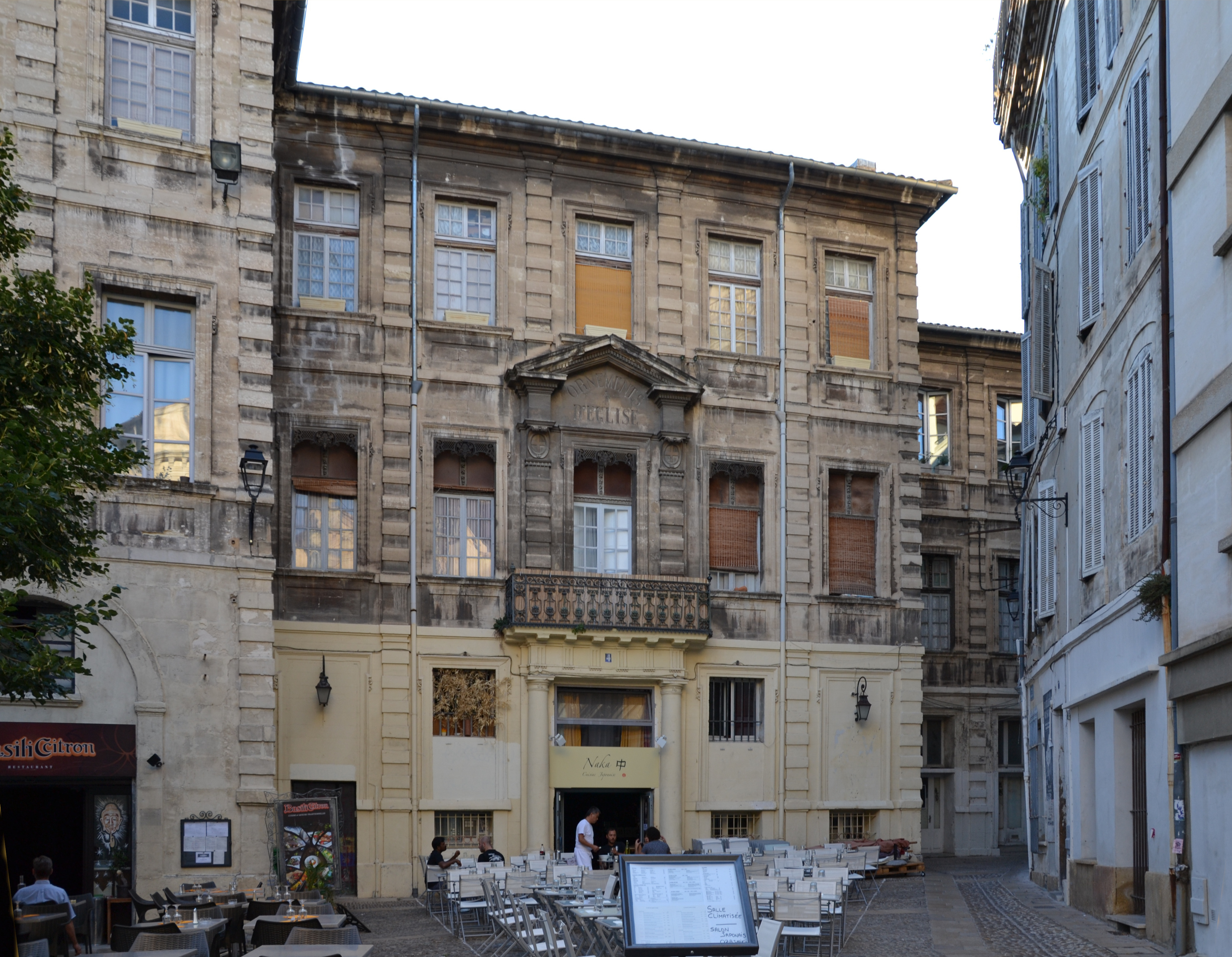 Hôtel de Verclosélévation, toiture (Inscrit)